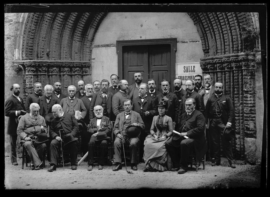 Entrée de la salle Capitulaire, cloître du couvent des jacobins. Entre le 23 et 29 septembre 1887. Portrait de groupe de la section de géologie du congrès de l'Association Française pour l'Avancement des Sciences. En tout 26 personnes ; sont identifiés au premier rang, de gauche à droite assis : Perceval de Loriol (en 2e position), Juan Vilanova y Piera, Auguste Pomel, Amélie Zurcher, Edmond Fuchs ; au second rang debout : Félix Regnault, Eugène Trutat (en 4e position), Charles Barrois (au centre en 13e position), Jules Bergeron (à l'extrême droite).